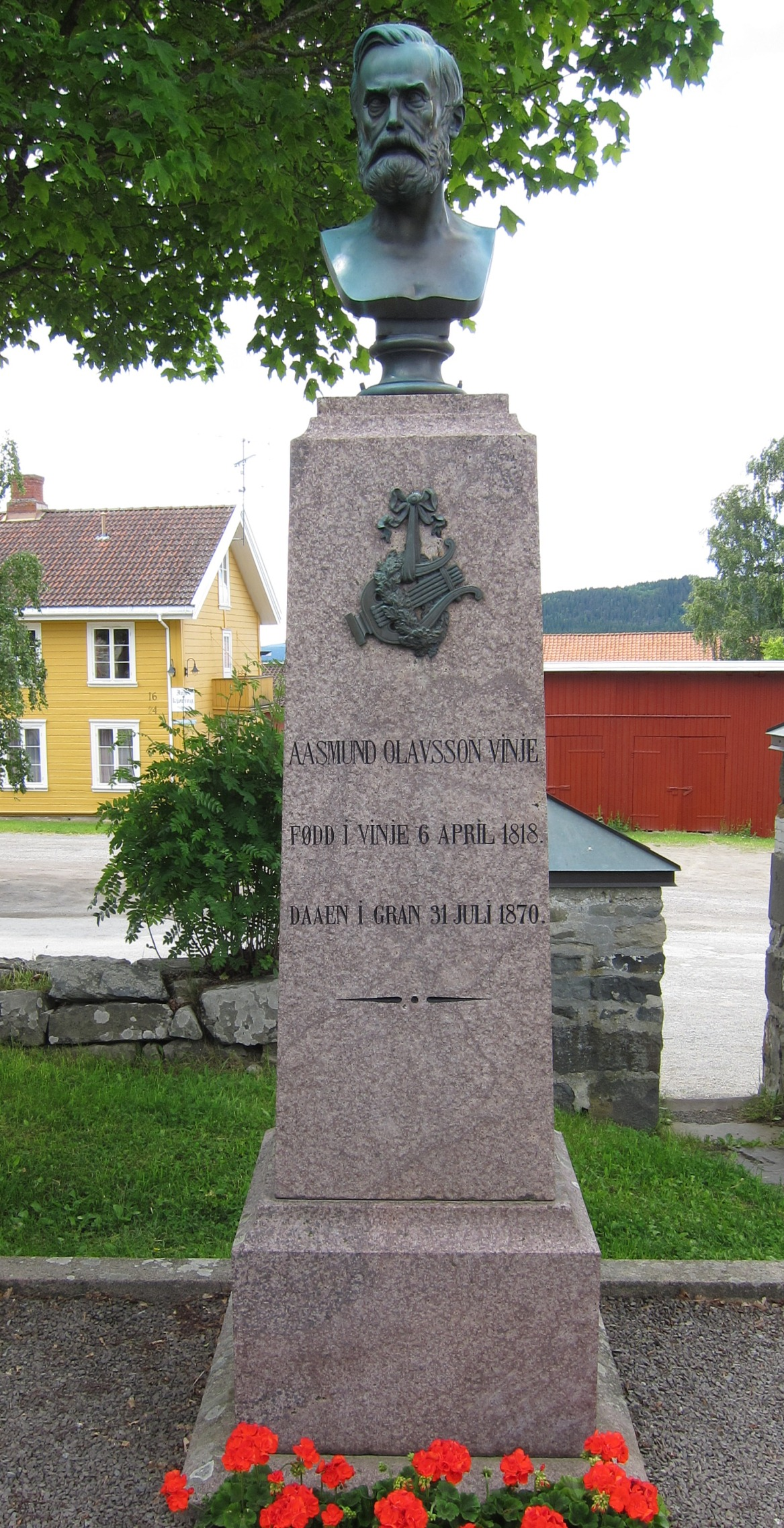 Monument med byste av A.O. Vinje ved søsterkirkene på Granavollen i Gran.